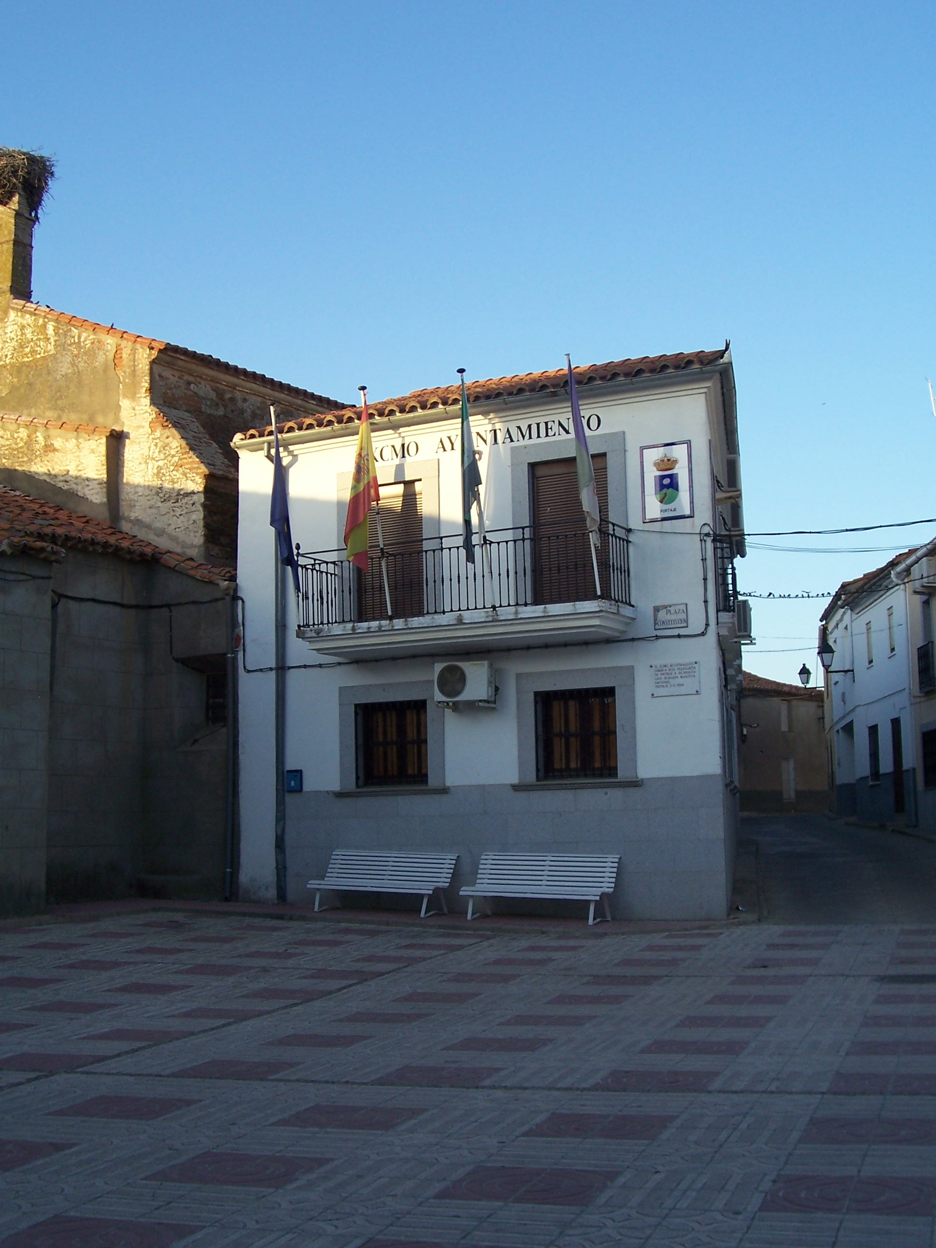 Casa consistorial de Portaje, provincia de Cáceres, España.